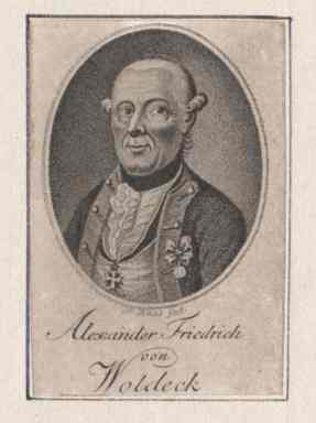 Generalleutnant Alexander Friedrich von Woldeck Datum: um 1780 Urheber: unbekannter Portraitmaler Quelle